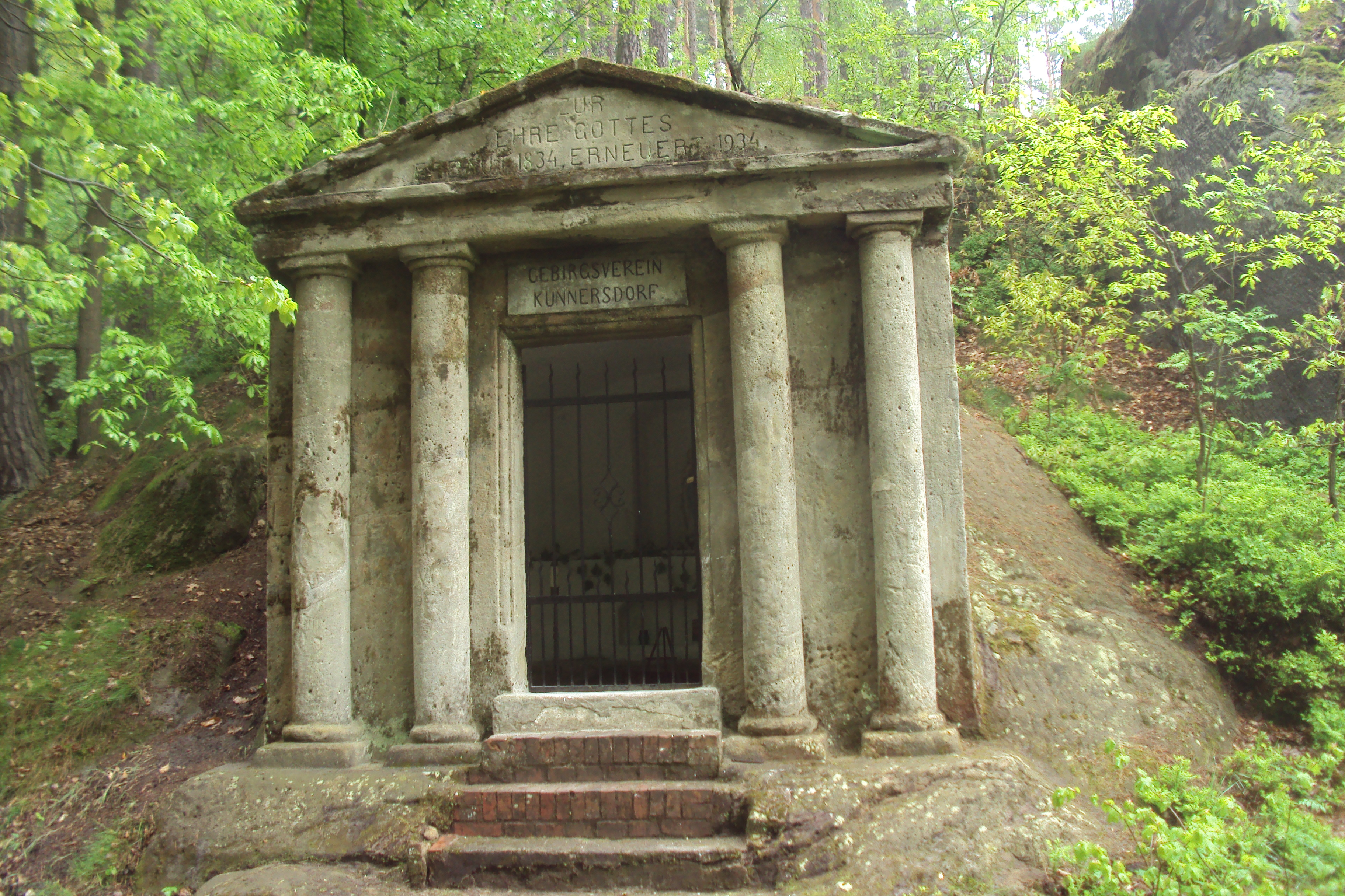 Skalní kaple je v polovině cesty mezi Drnovcem a Kunraticemi u Cvikova